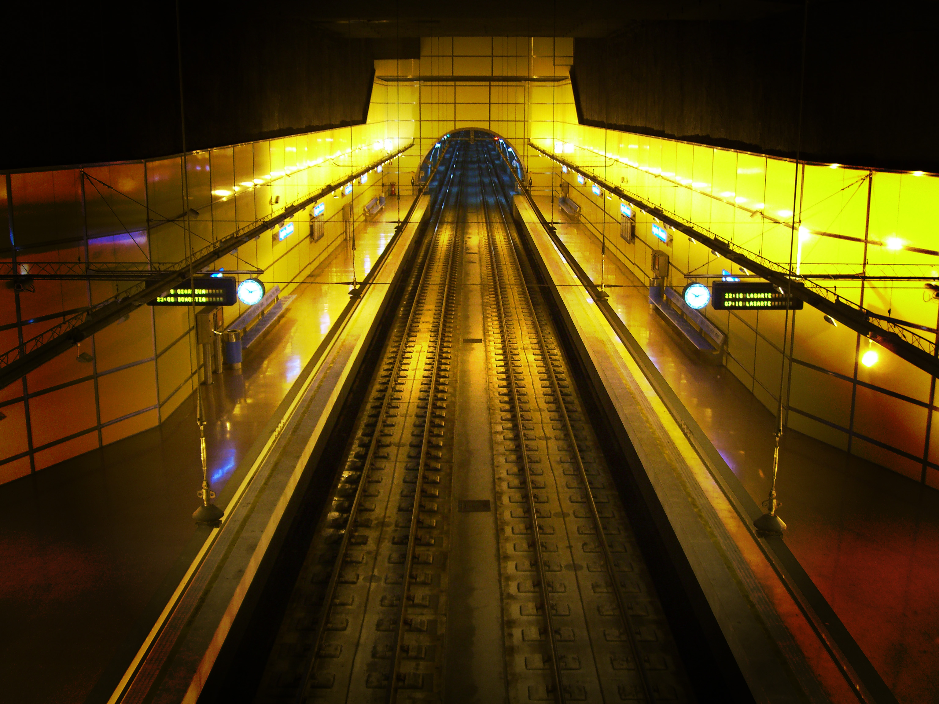 Estación del Topo en Lugaritz (San Sebastián, Spain)